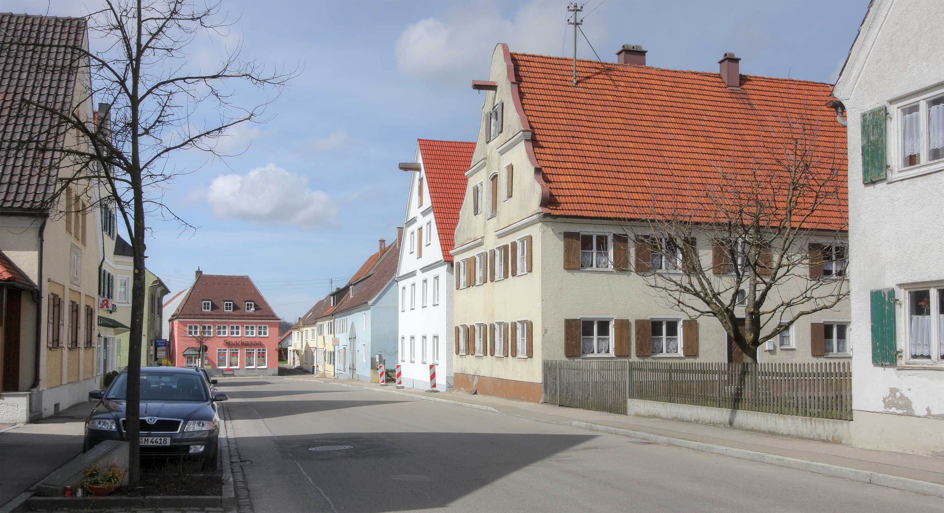 Jettingen-Scheppach, Ansicht Jettingen Weberstraße